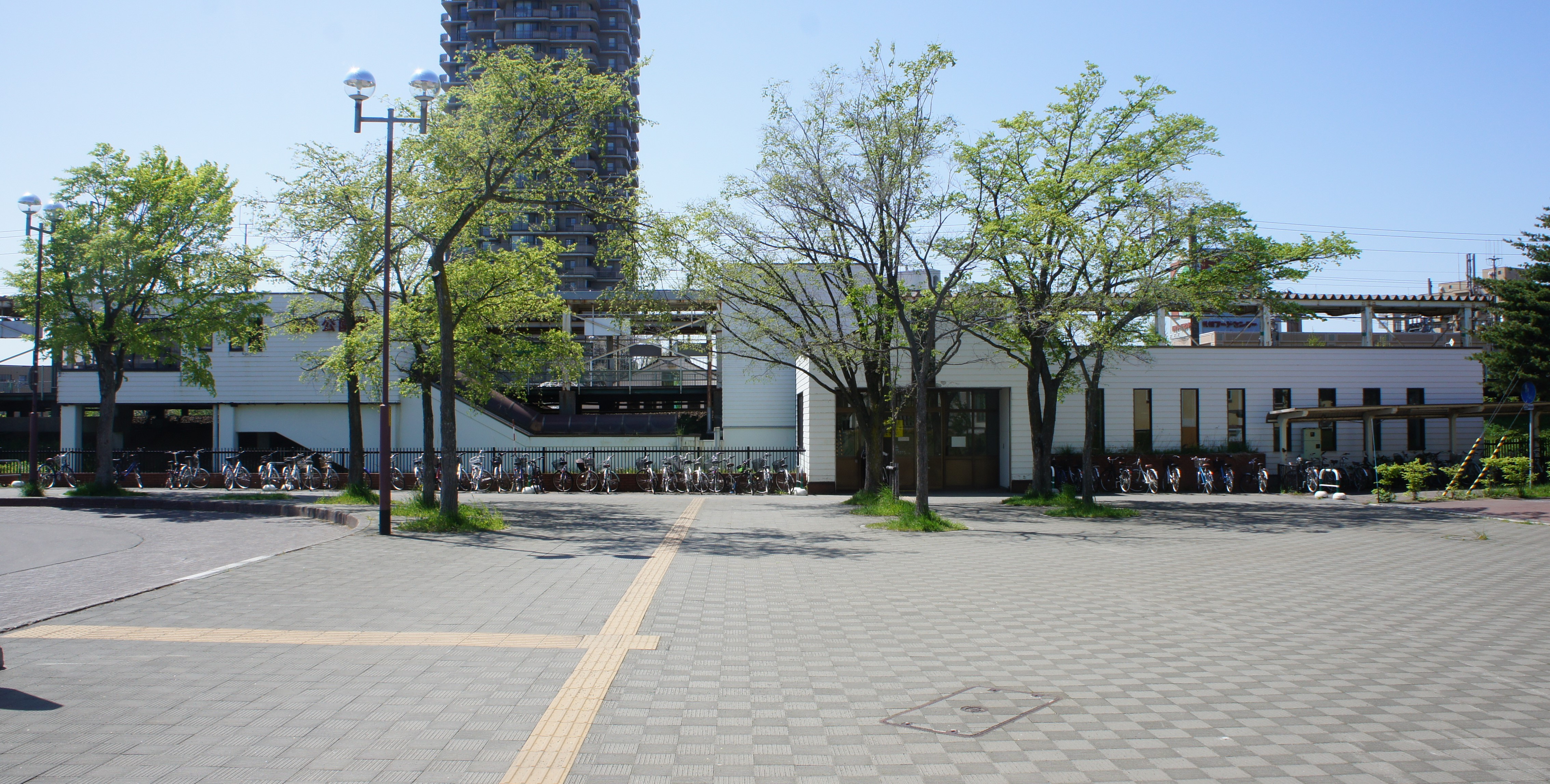 JR函館本線・森林公園駅の東口駅舎